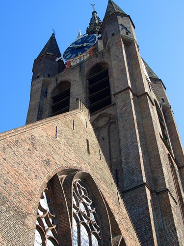 Delft - Església vella